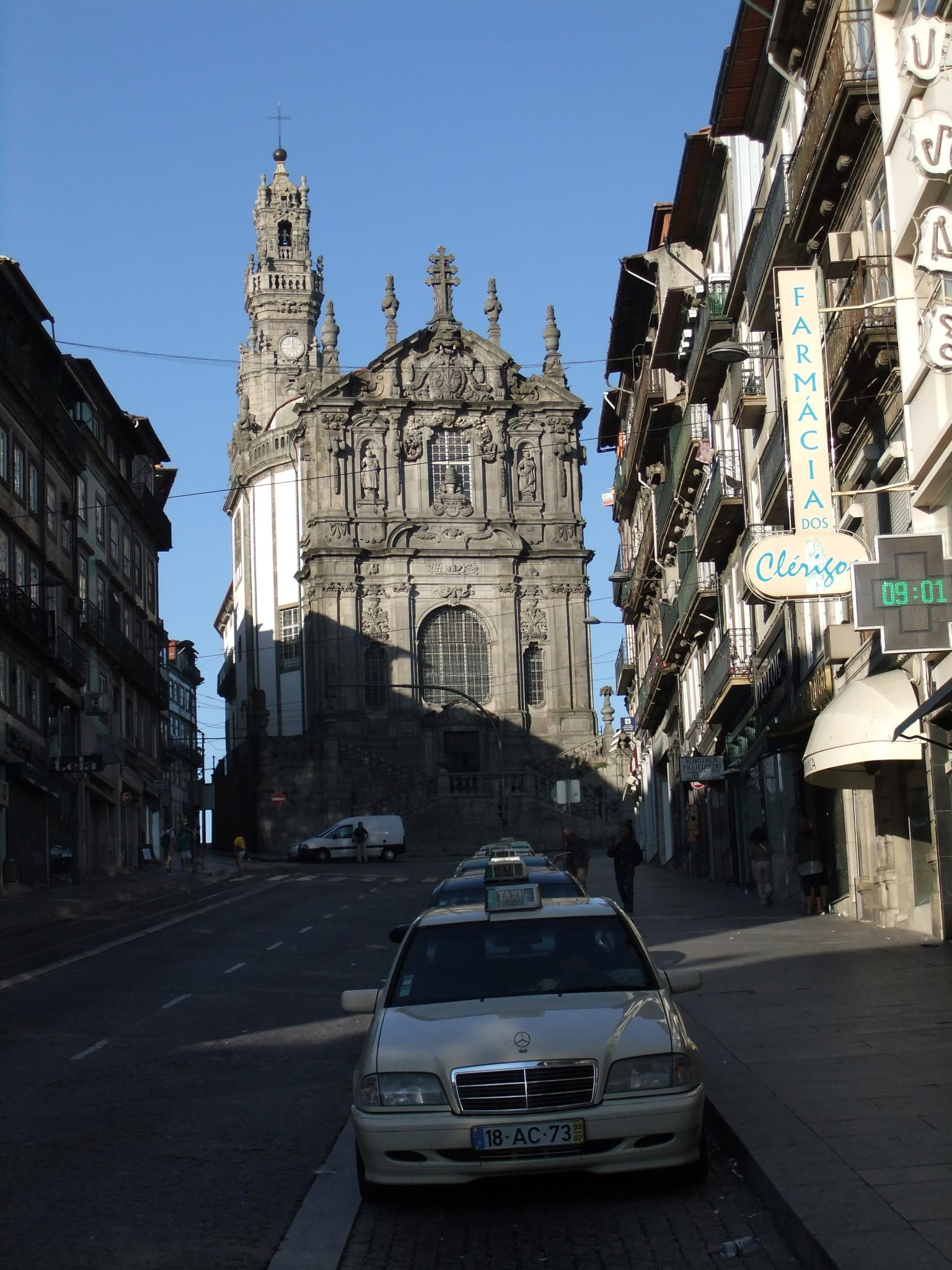 Porto